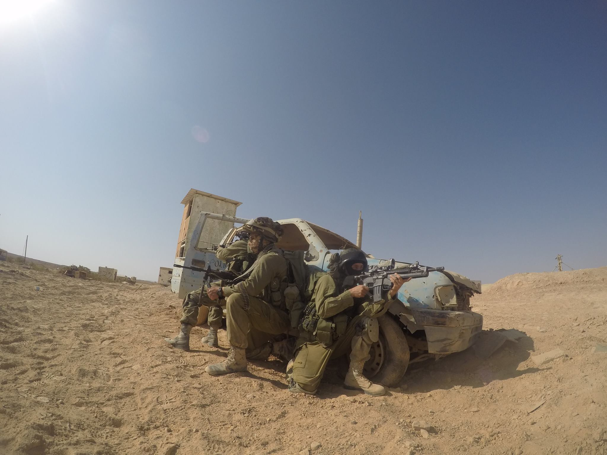 לוחמים באימון לש"ב בשיזפון